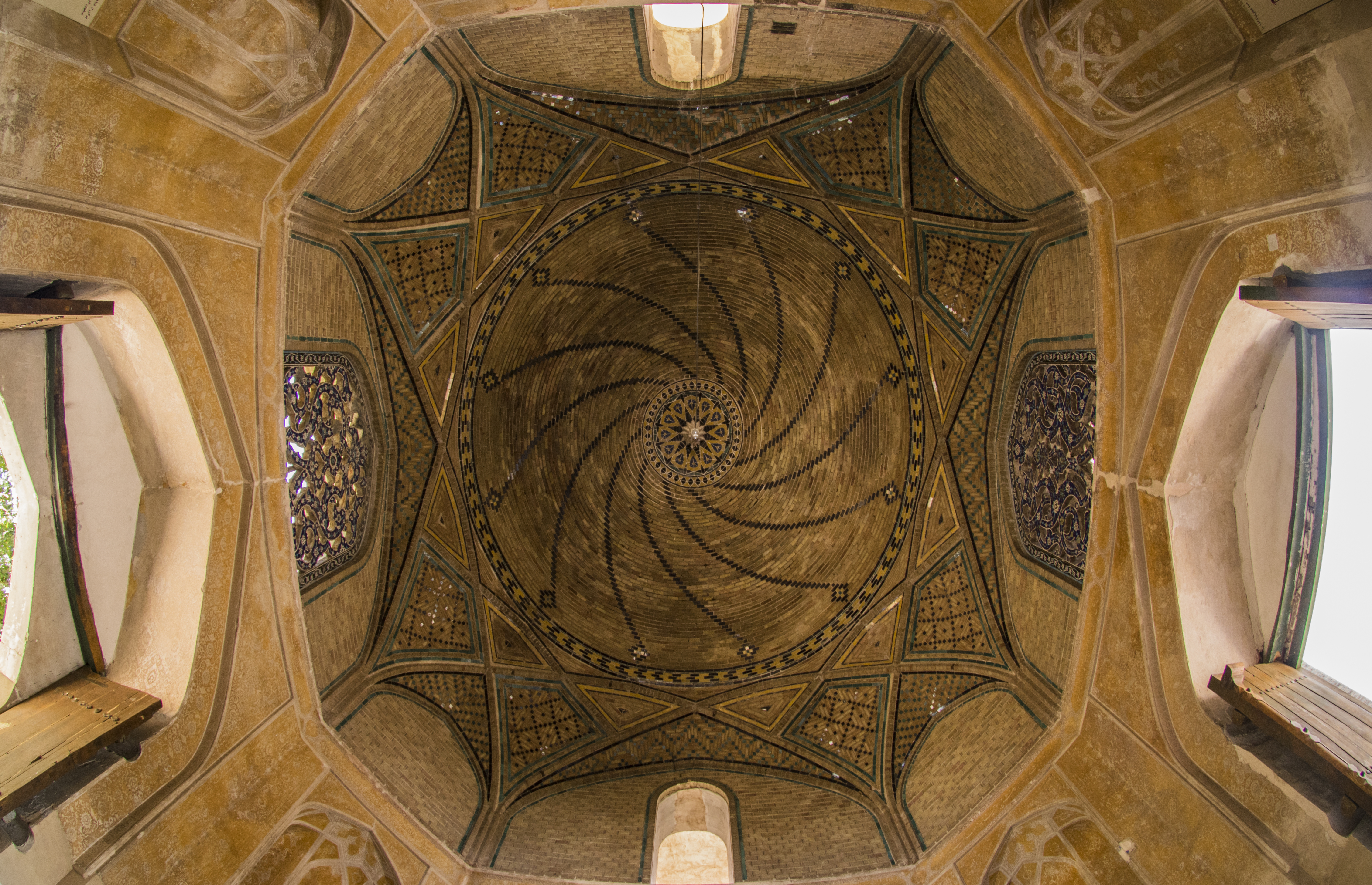 باغ سعادت‌آباد